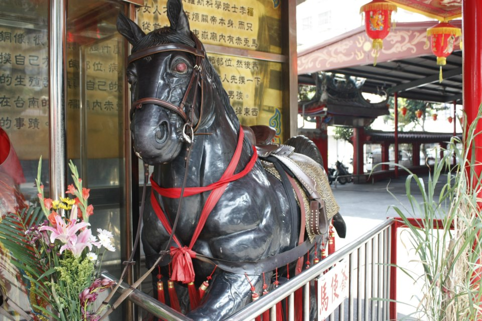 關帝殿赤兔馬